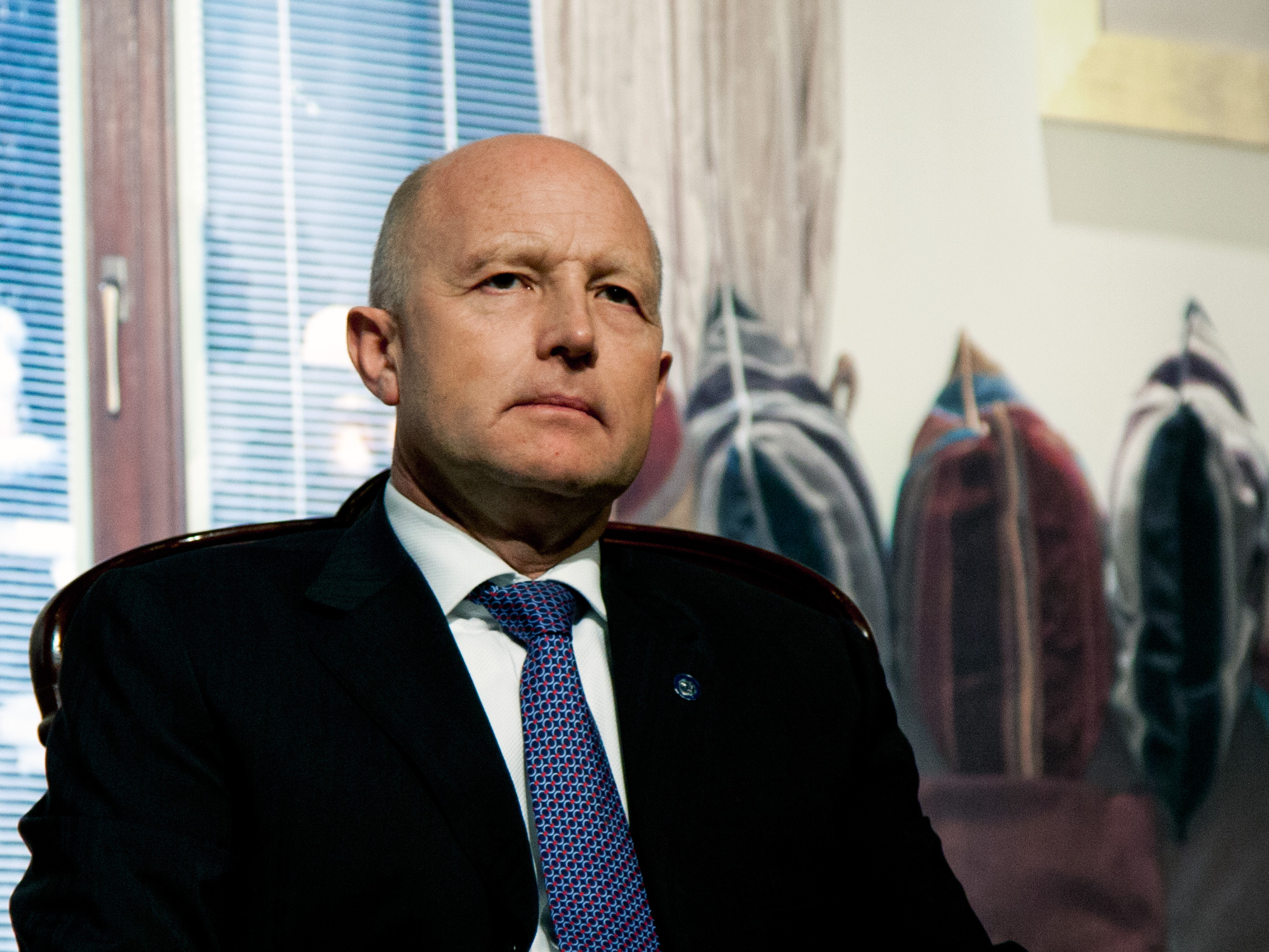 Andrzej Piotr Klesyk (ur. 10 kwietnia 1964 w Lublinie) – polski menedżer, prezes zarządu PZU.